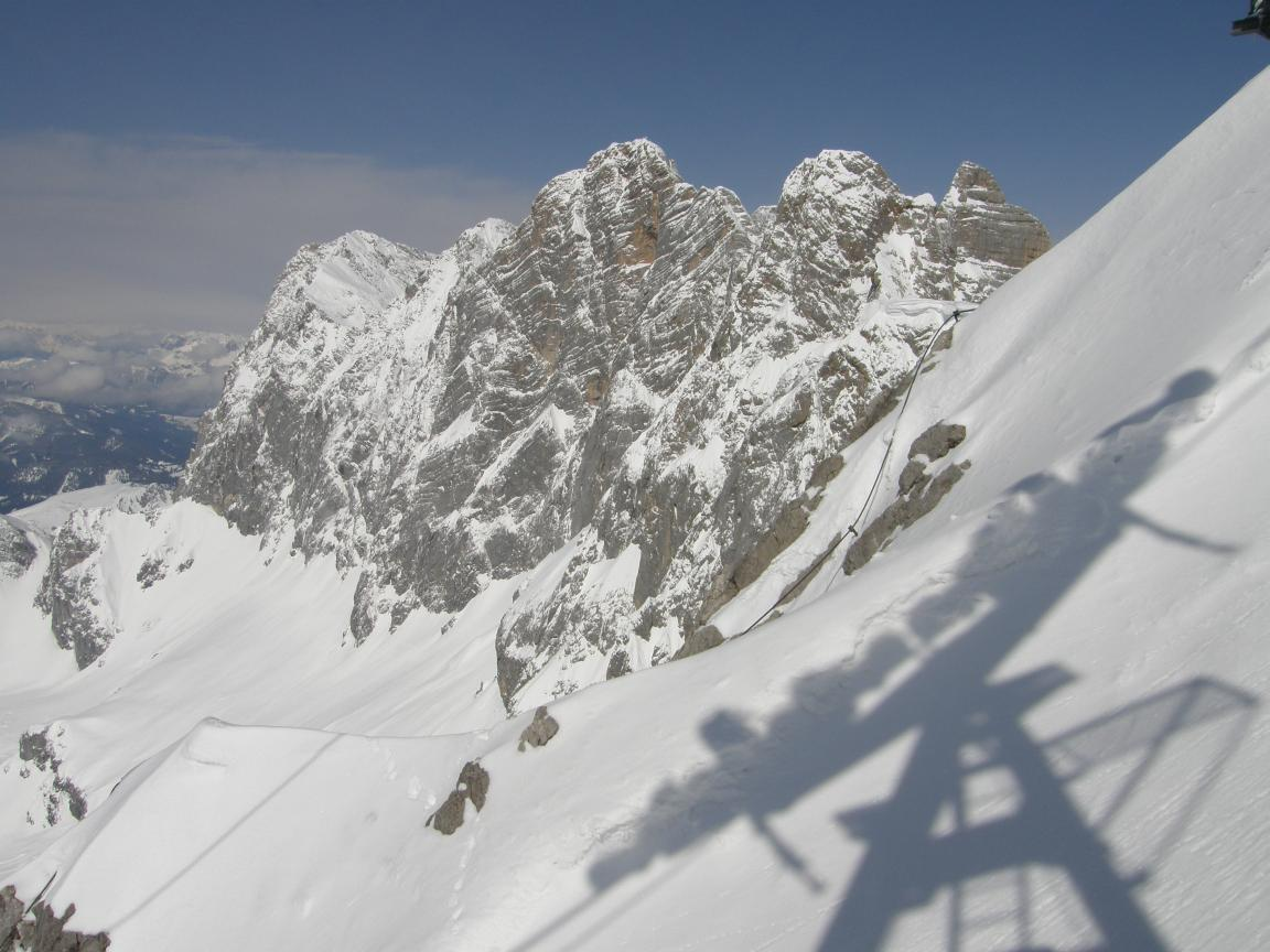 Dachstein - 2995 m